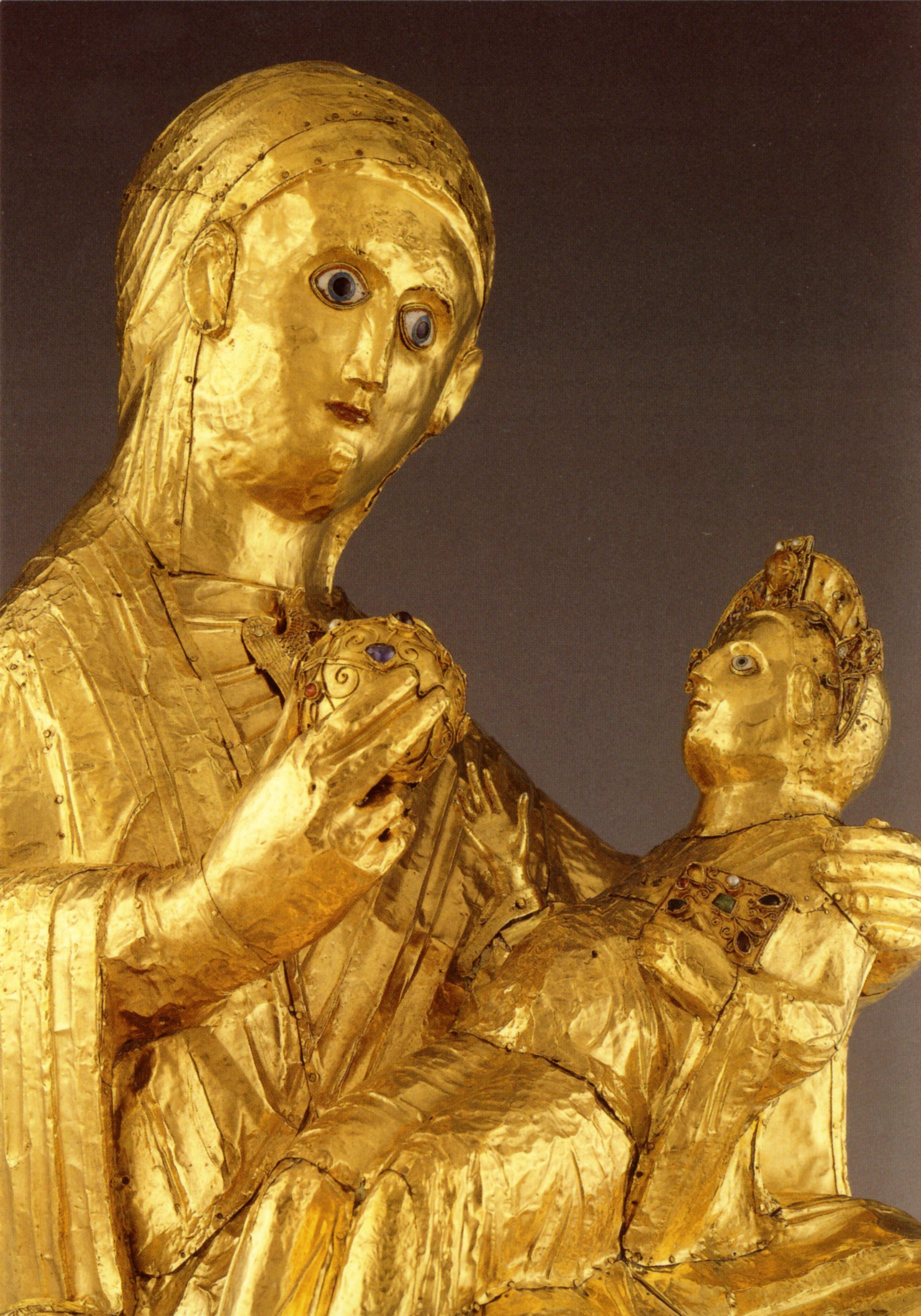 Golden Madonna of Essen (detail)